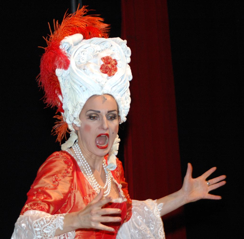 Annette Postel bei ihrem Auftritt auf der 22. Freiburger Kulturbörse 2010